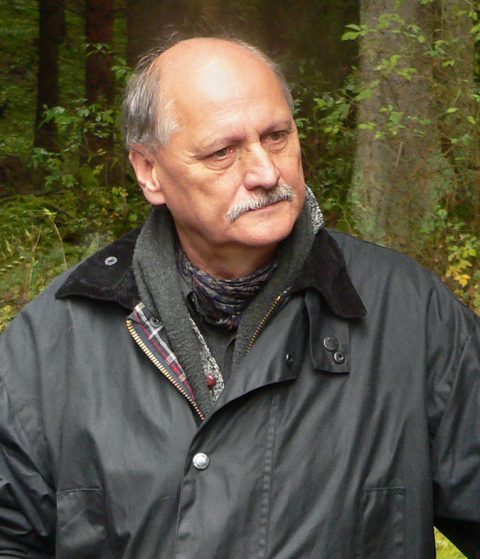 Hans-Georg Stephan, Führung im Solling